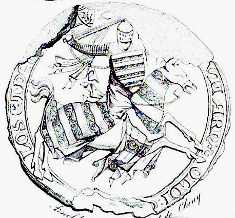 Arnoul V de Looz